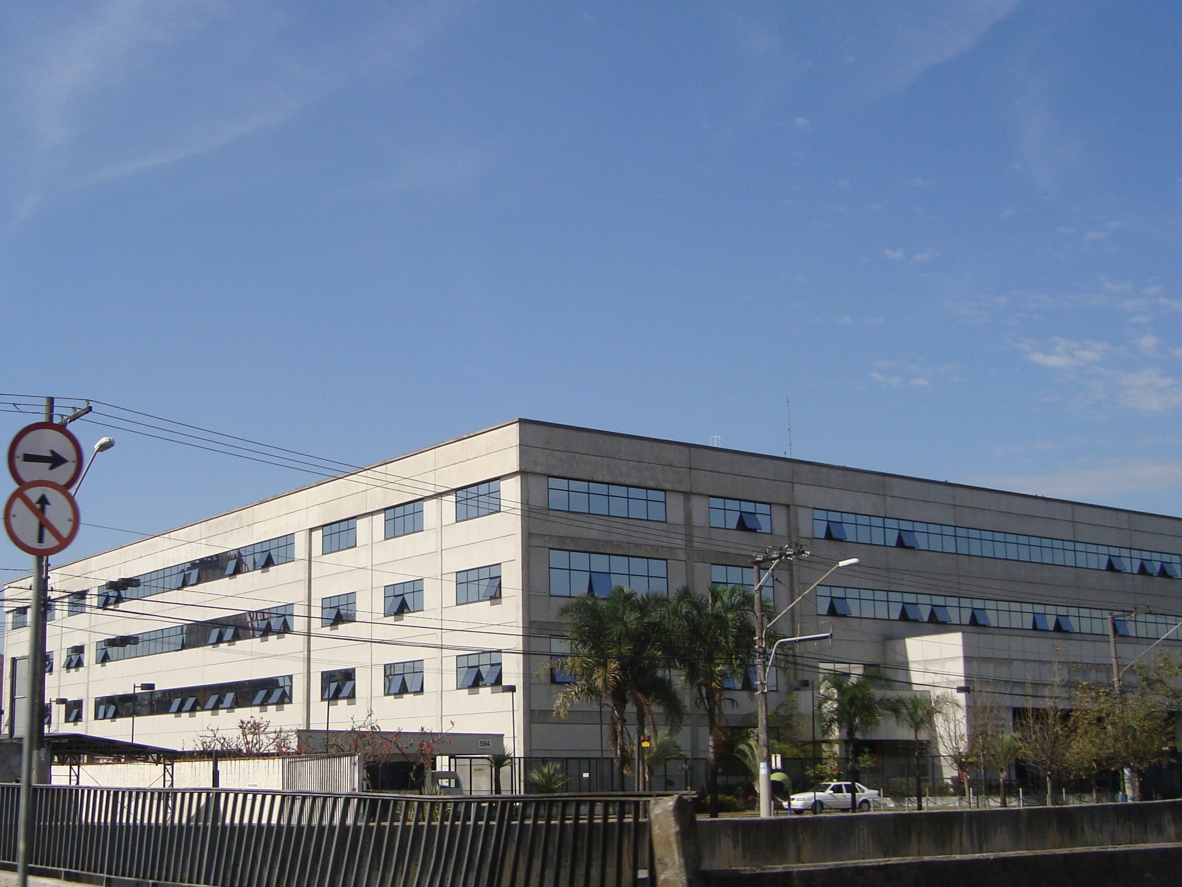 Fórum de Santana são paulo